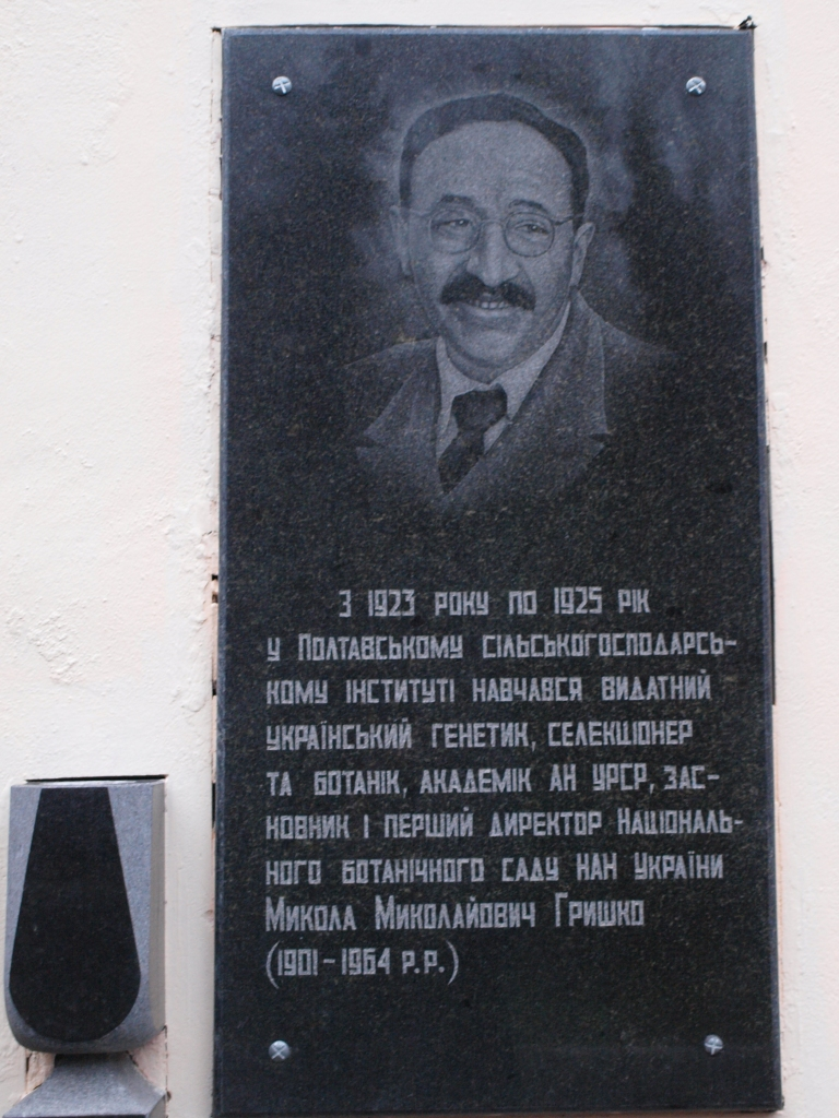 Мемориальная доска - академик Николай Николаевич Гришко, основатель ботанического сада АН УССР, учился в Полтавском с/х институте с 1923 по 1925 год